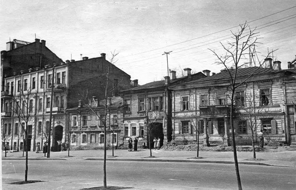 Дома 24, 26 и 28 по улице Прозоровской (сейчас Эспланадной), Киев . Фотография из архива Т.А.Бормотовой (Вороновой), сделана 1 мая 1955 года фотокорреспондентом РАТАУ — ТАСС А.Т.Бормотовым.